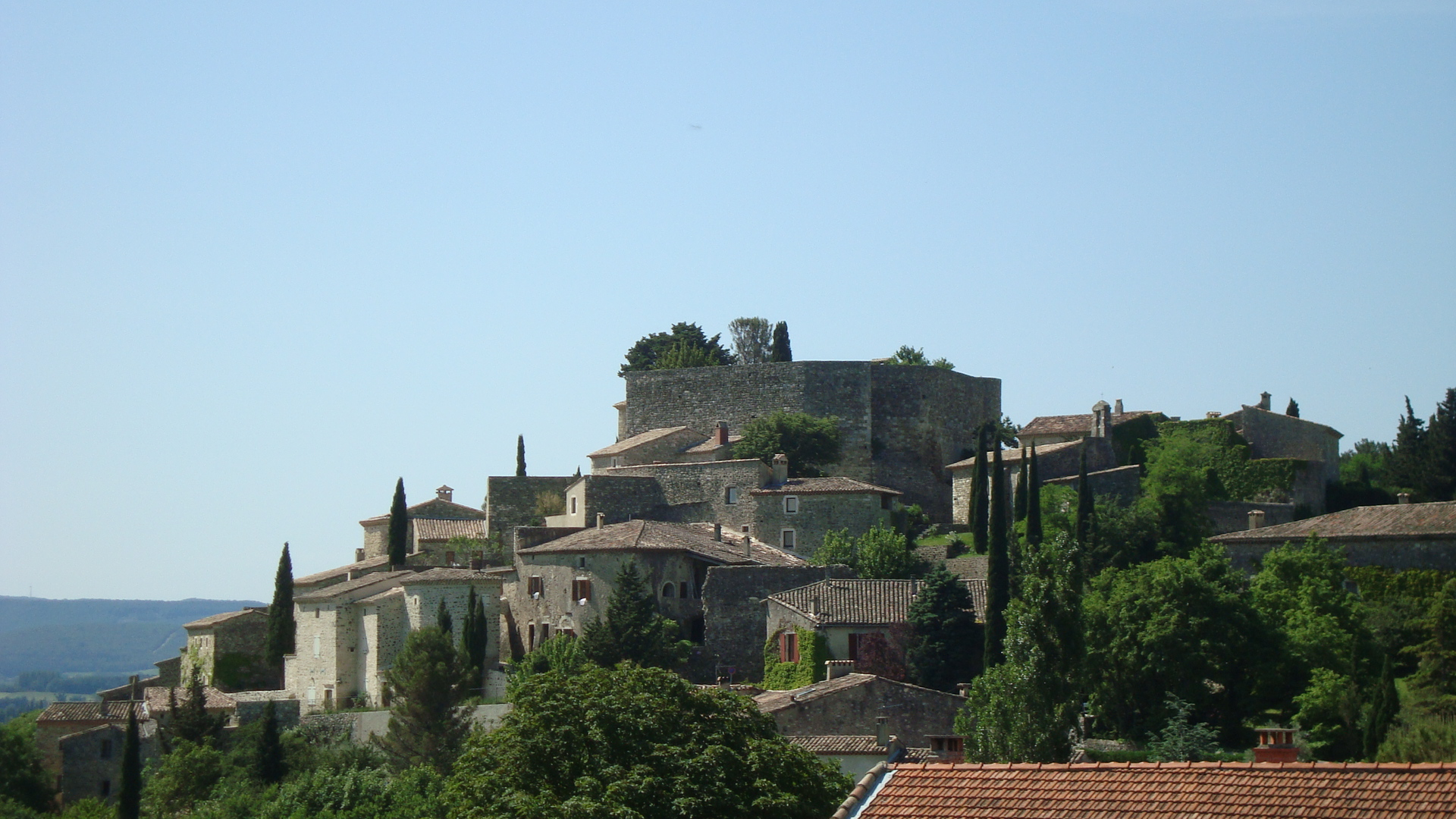 Drôme, France